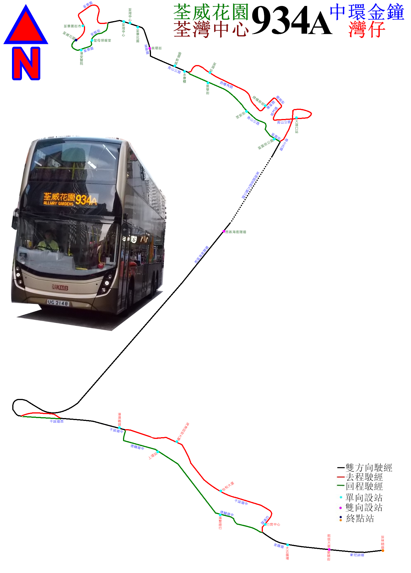 中文（香港）: 過海隧巴934A線的走線圖